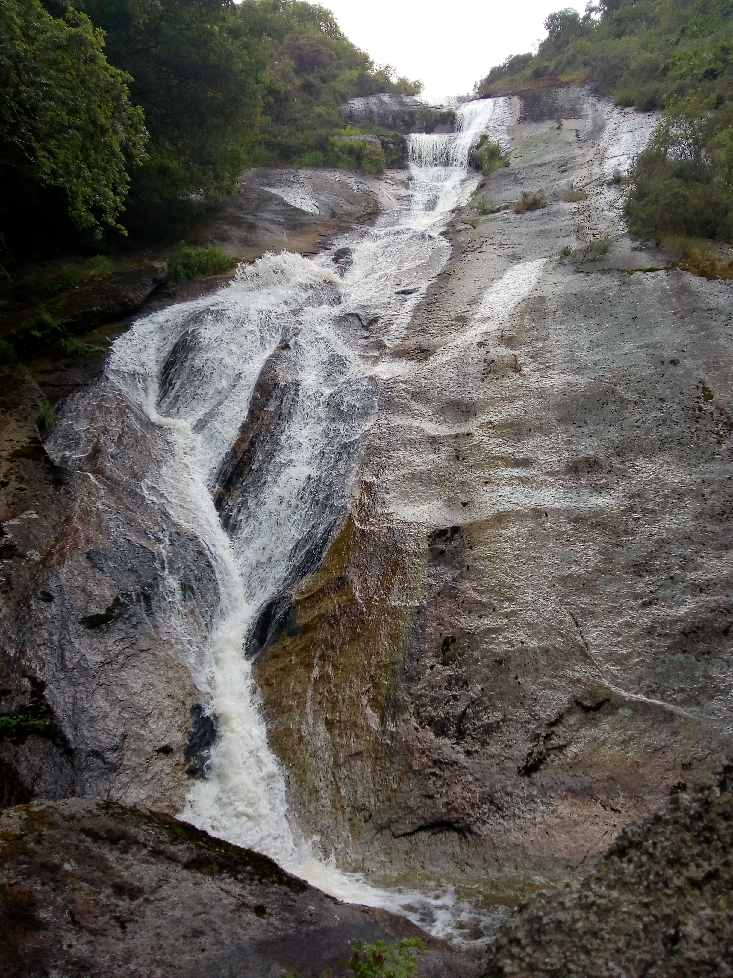 Fervenza de Escouridal